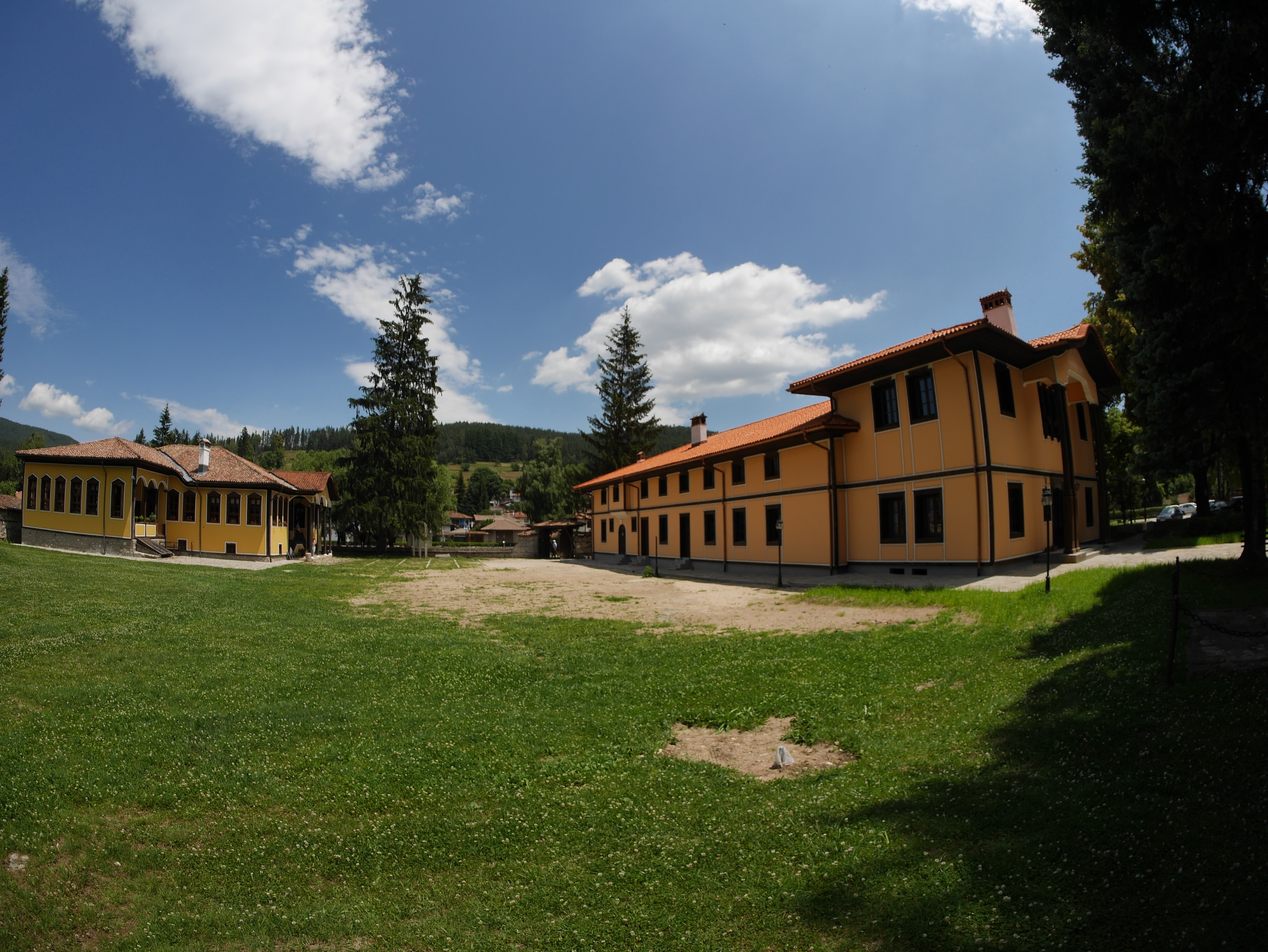 Град Копривщица